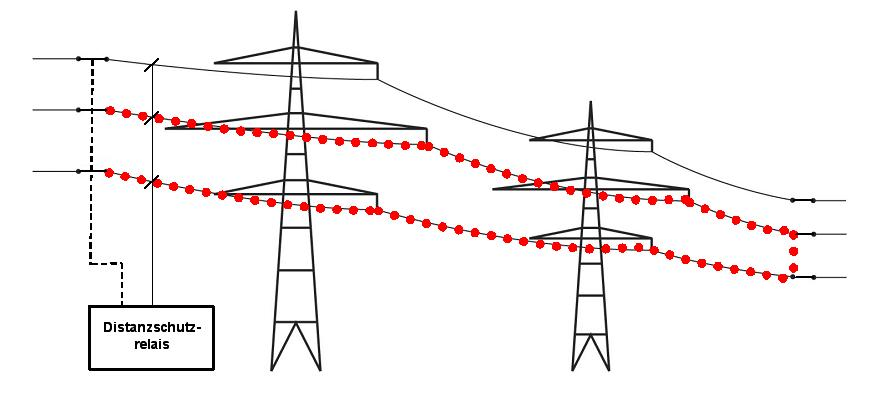 Schematische Impedanz einer Hochspannungsleitung (Leiter-Leiter-Schleife).